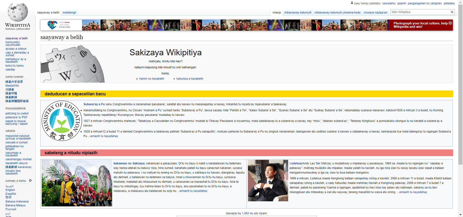 撒奇萊雅語維基百科首頁在2020年2月10日的截圖。